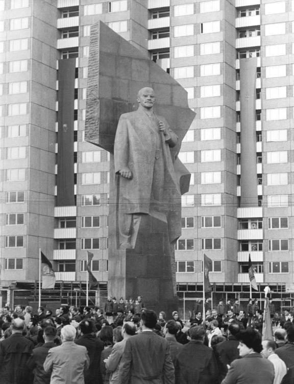 Zentralbild-Ludwig 5.5.70 Berlin: Pionierparade auf dem Leninplatz. Die junge Generation der DDR gestaltete am Abend des 5.5.70 mit einem eindrucksvollen Bekenntnis ihrer Treue zum sozialistischen Vaterland einen Höhepunkt für die Delegierten des VII. Pädagogischen Kongresses. Die Berliner und ihre Gäste nahmen an dieser überzeugenden Demonstration regen Anteil. Die abendliche Veranstaltung bildete den Auftakt für das 6. Pioniertreffen in Cottbus.